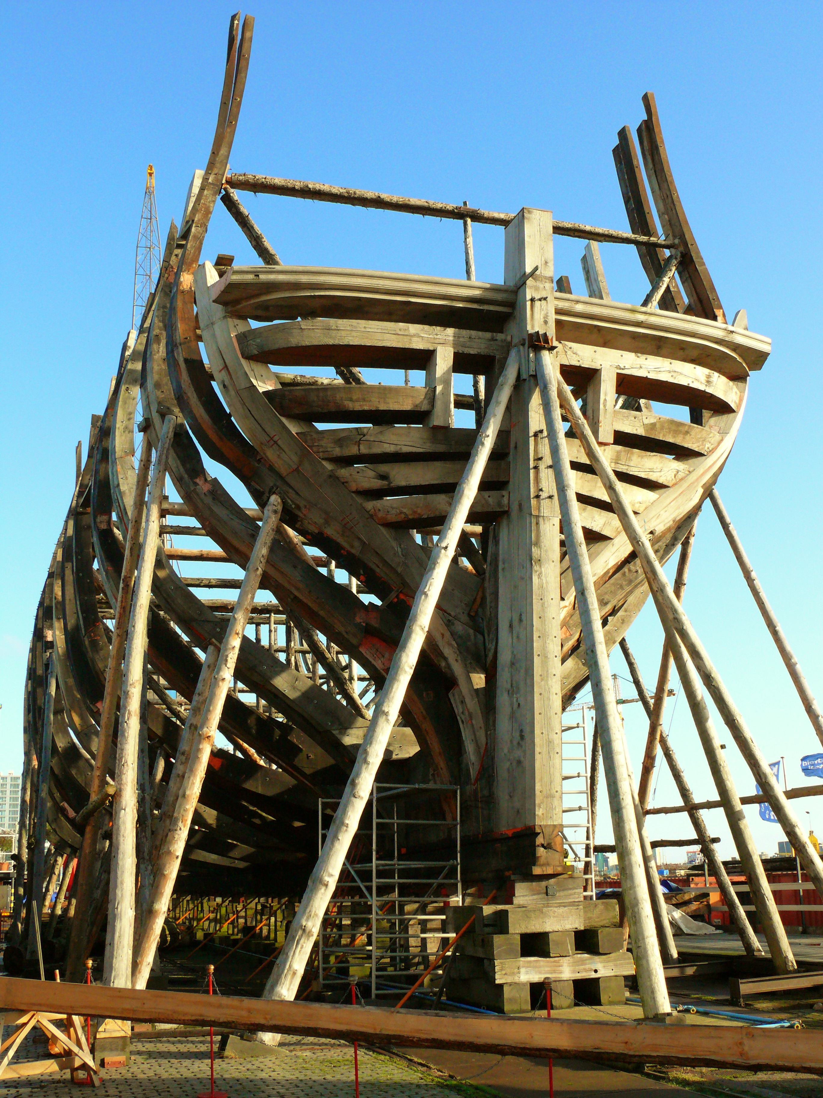 Herbouw Linieschip De Delft Rotterdam (Delfshaven)(1783-1797) foto: 2008 - Replica Ship of the Line De Delft Rotterdam The Netherlands